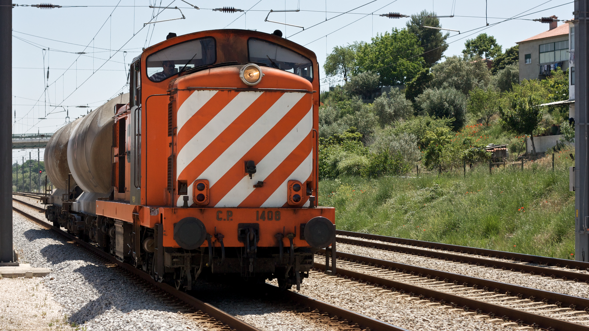 Tipo: Comboio de Volta (transporte de cimento) 77331 [Entroncamento - Ramal Lamarosa • Cimpor] Local: Estação da Lamarosa [Linha do Norte, PK 114 • Ramal de Tomar, PK 0,0] Data e hora: 6 de Maio de 2009 [13h53] Material: Locomotiva 1408 + 2 vagões Transfesa Uacs